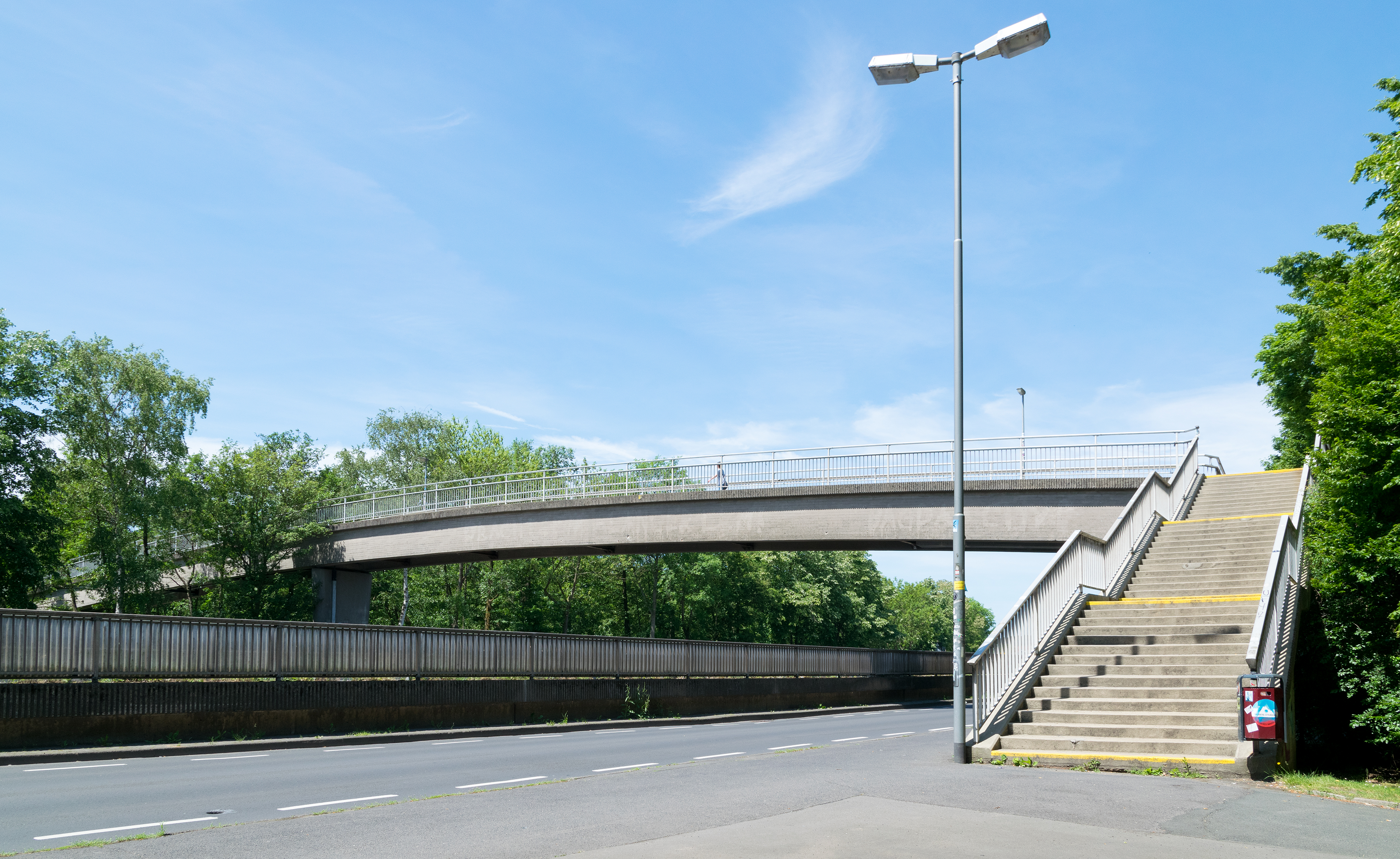 Fußgänger-/Radfahrerbrücke über die Lahn und die Stadtautobahn B3a in Marburg